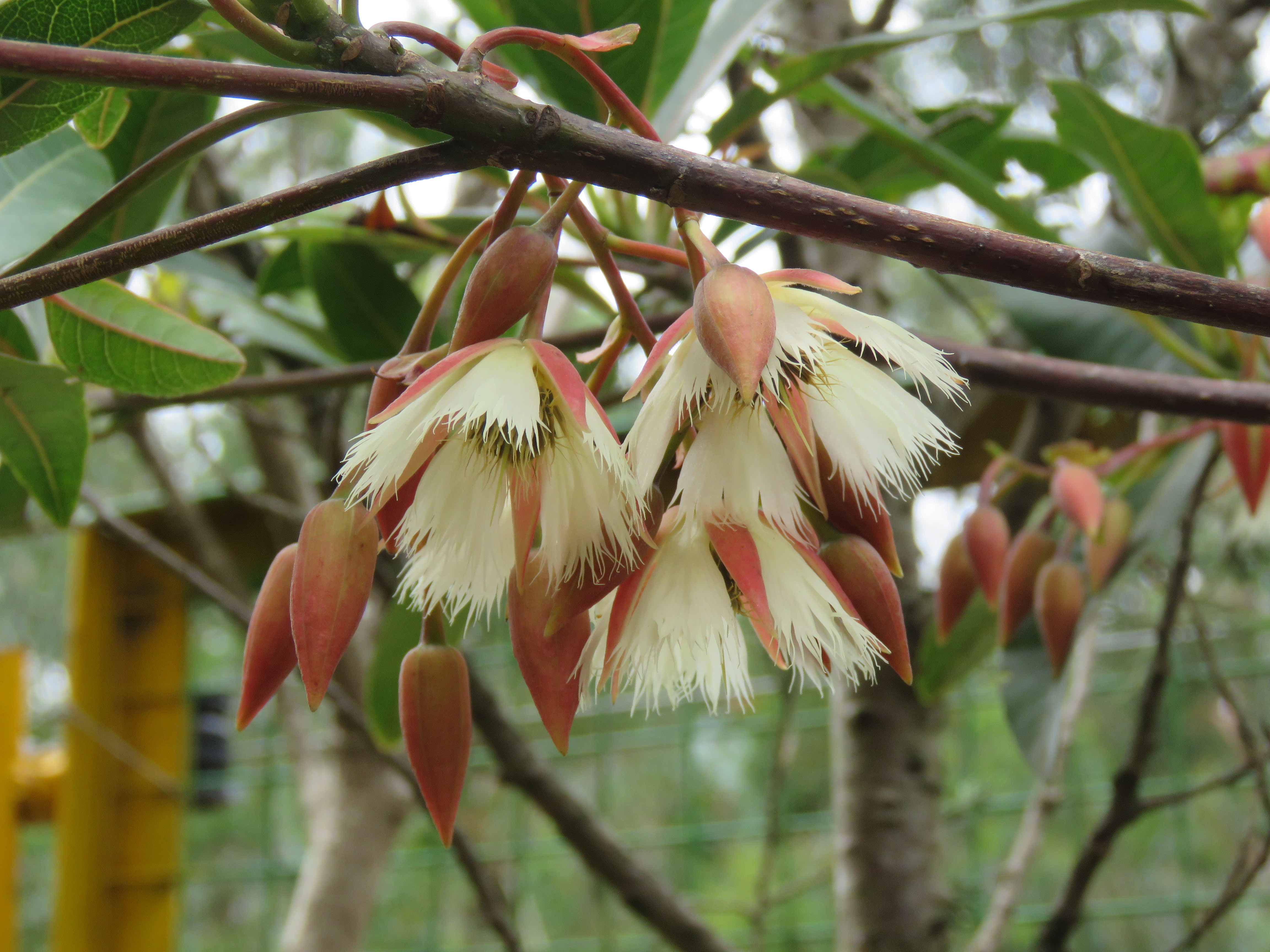 Photos by Vinayaraj